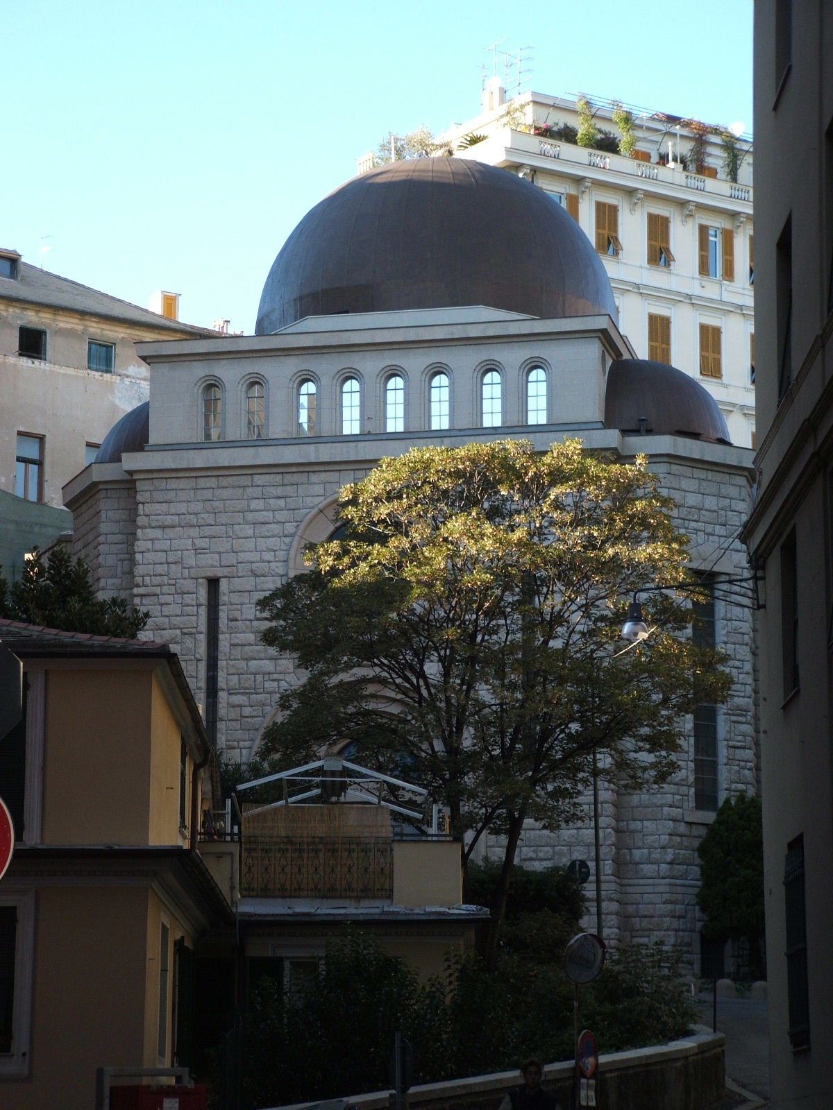 La Sinagoga di Genova. Immagine da Genova